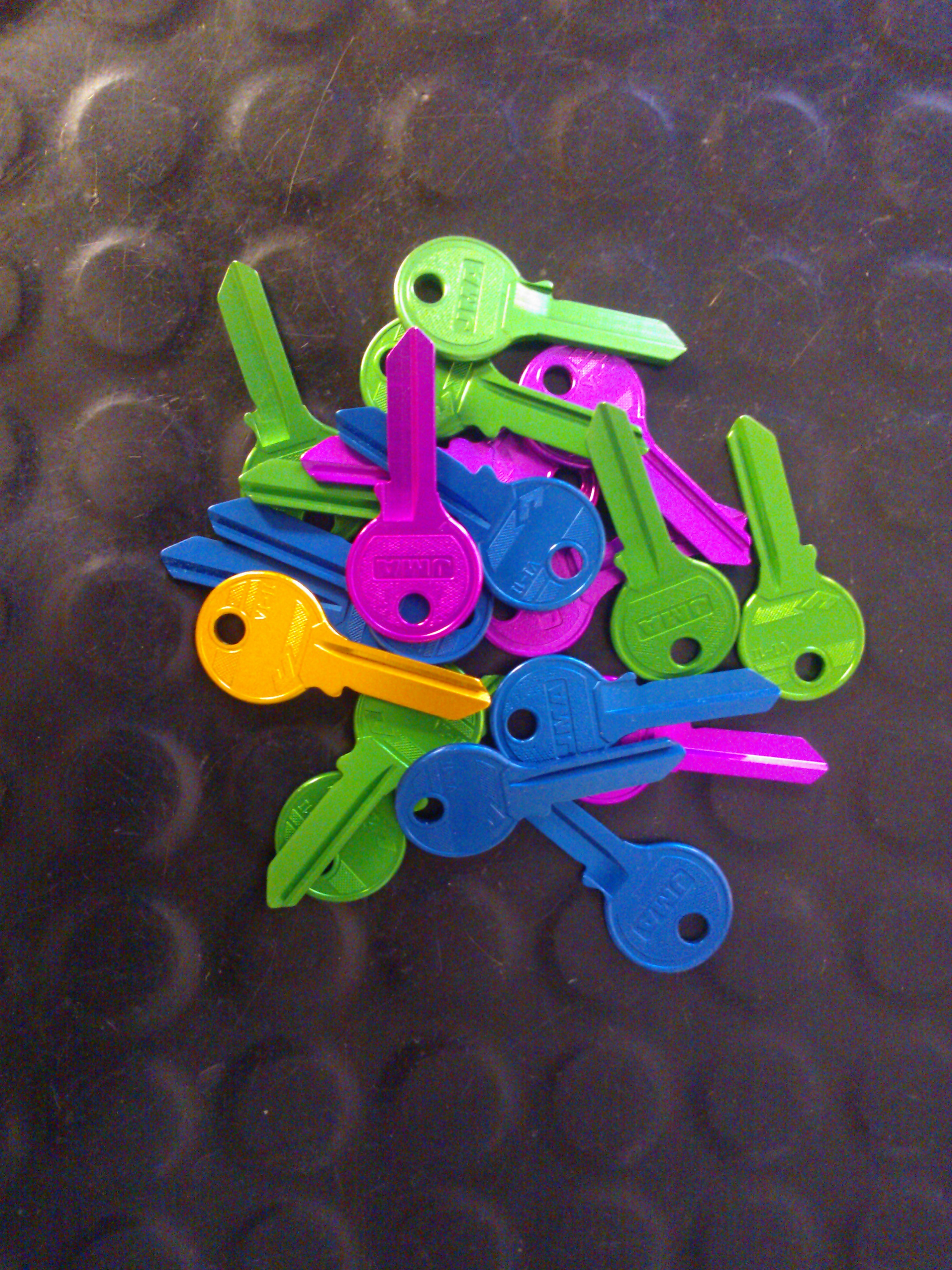 Llaves vírgenes de aluminio anodizado